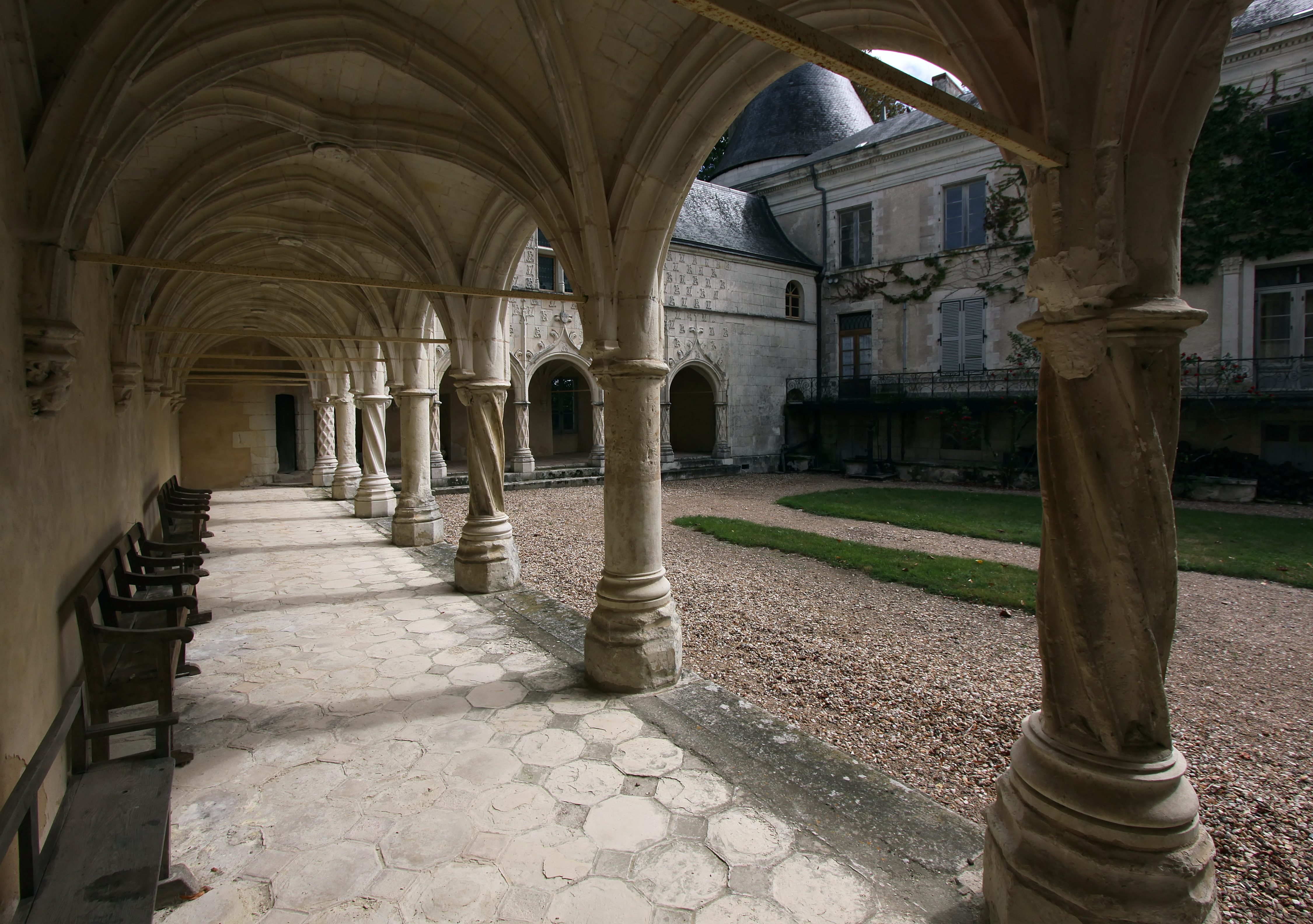 Schloss Argy im französischen Département Indre - längsseitige Galerie.